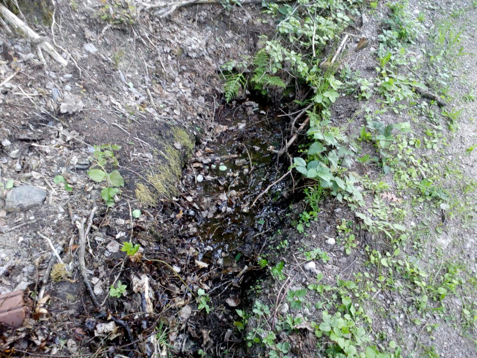 Mordbachborn im Quellgebiet des Mordbaches, Kleine Dhron, Hunsrück